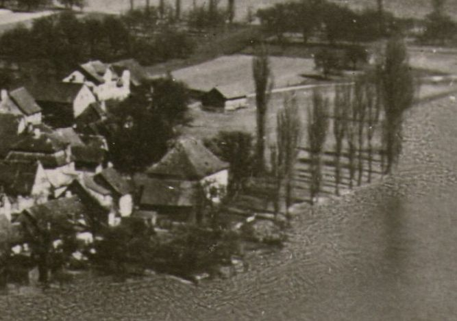 Synagoge von Wangen (Öhningen) - Alte Postkarte (Ausschnittsvergrößerung)